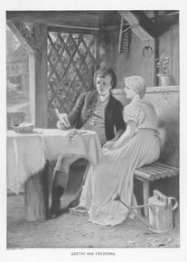 Goethe and Frederike. Gravering av Hermann von Kaulbach (1846–1909). Se [1]